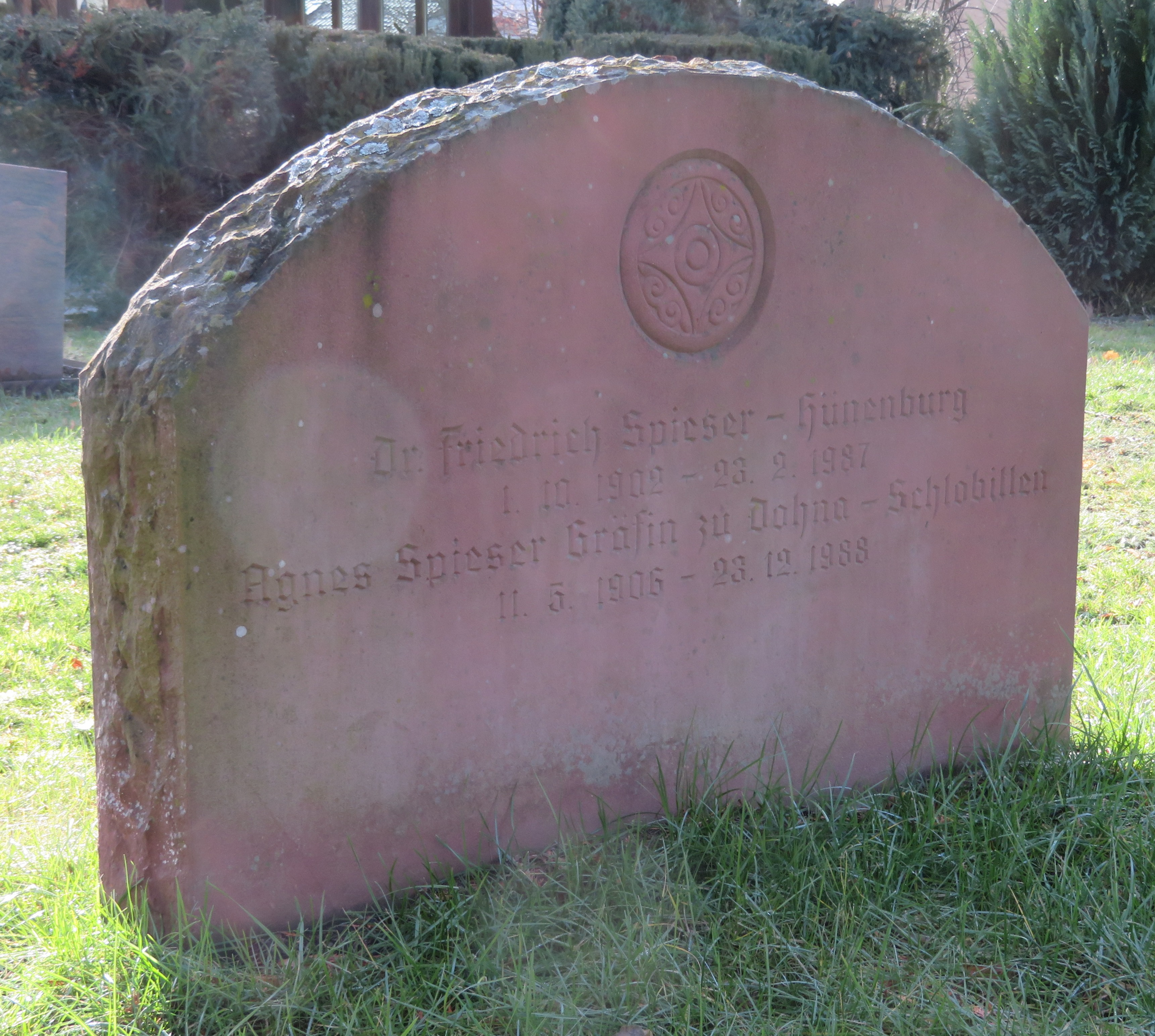 in Untergruppenbach